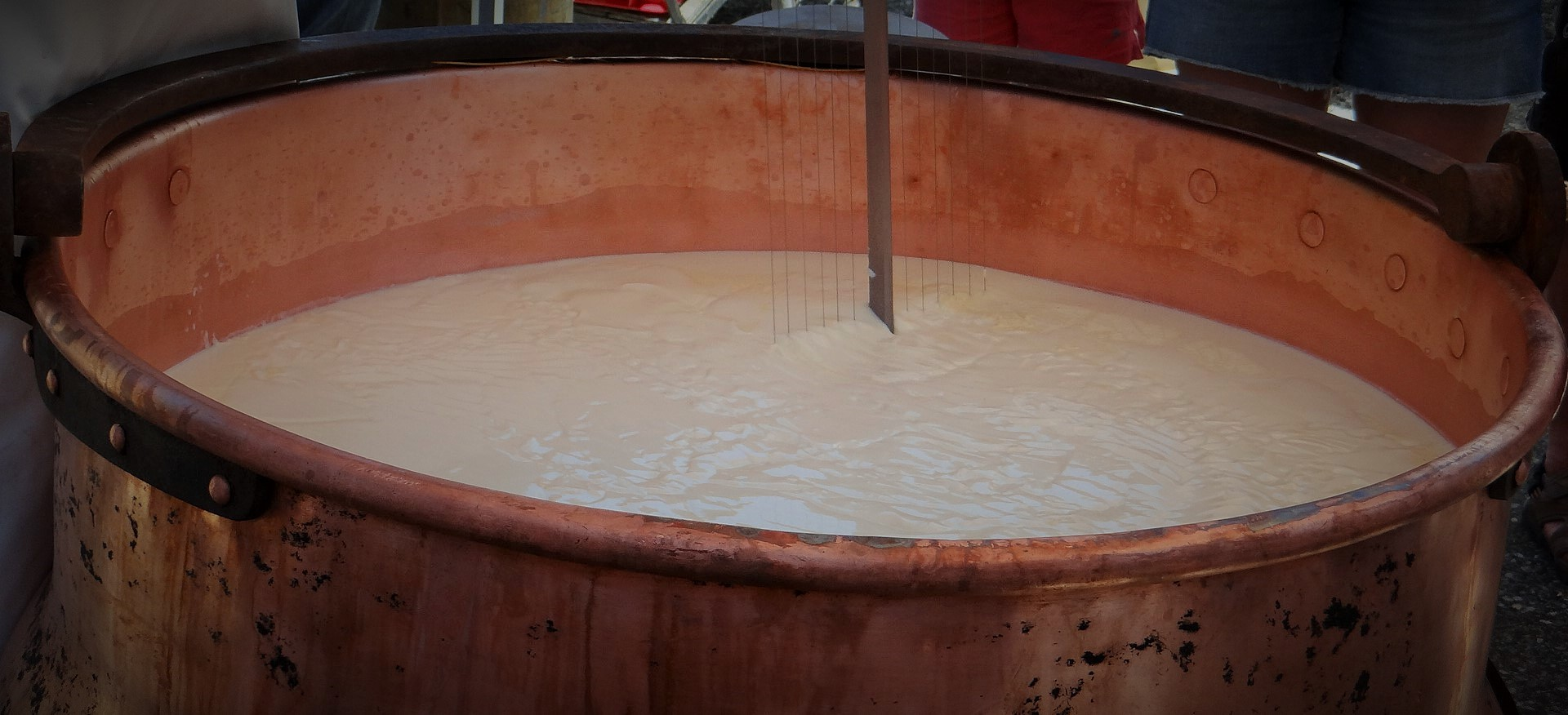 Fabrication traditionnelle du Beaufort par la Coopérative Laitière de Moutiers lors de la fête de l’Alpe et des Guides de Pralognan-la-Vanoise, 17 juillet 2016 ː décaillage